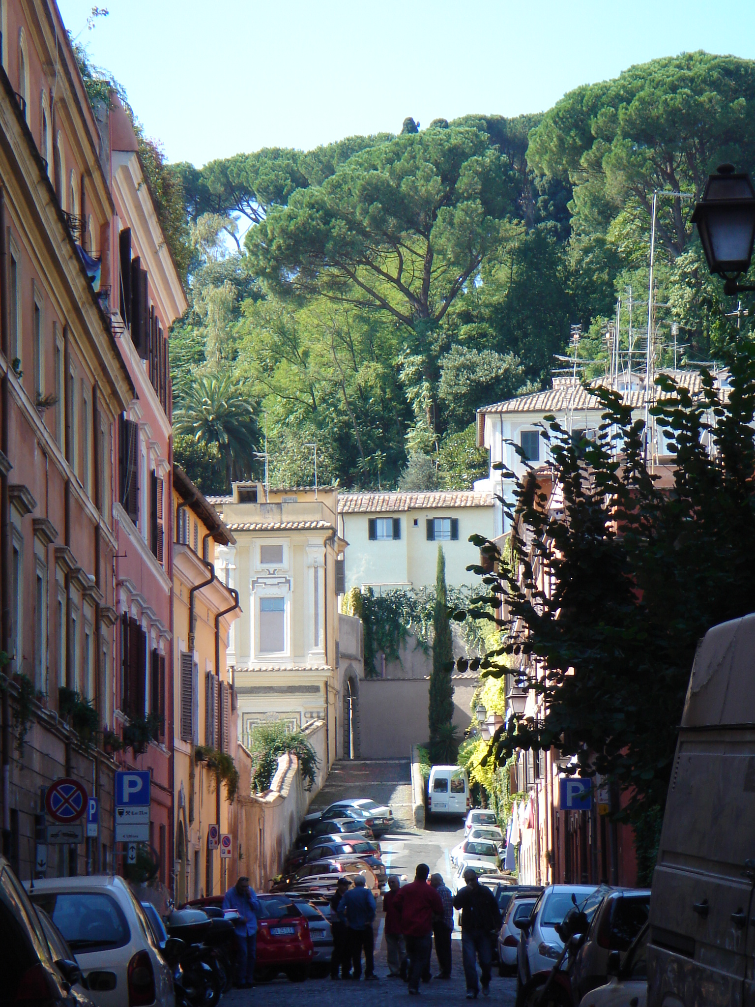 Roma, Trastevere: via degli Orti d'Alibert alla Lungara